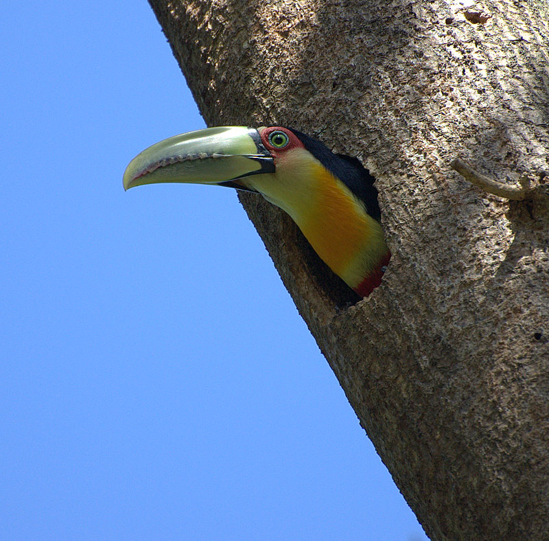 Jardim Botânico de São Paulo